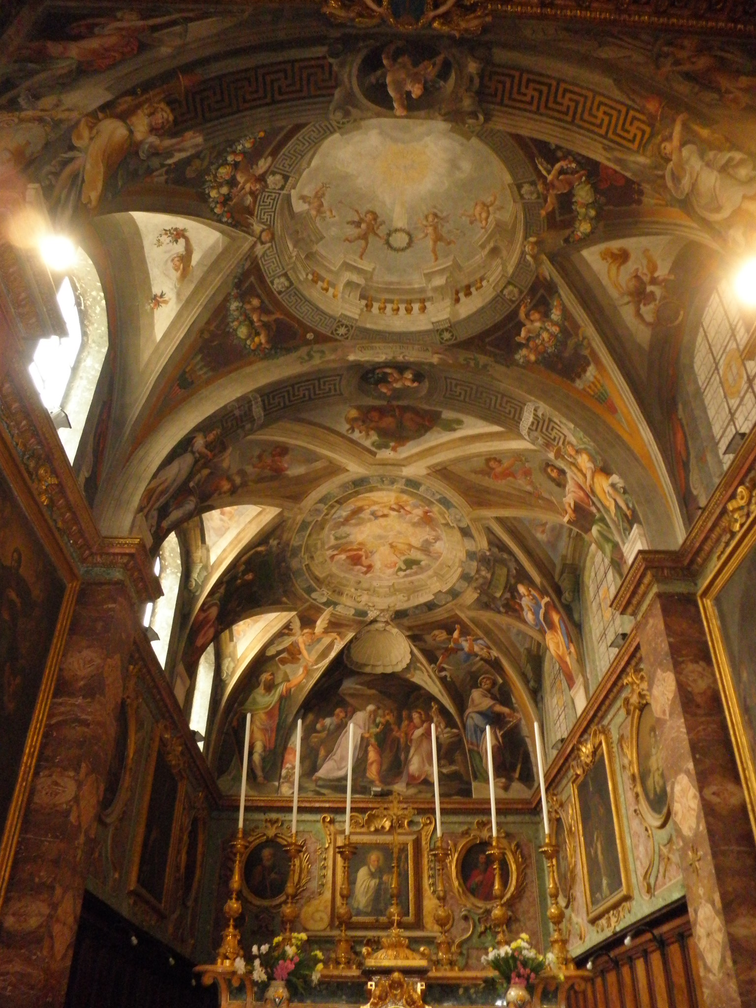 Roma, san Silvestro al Quirinale: coro